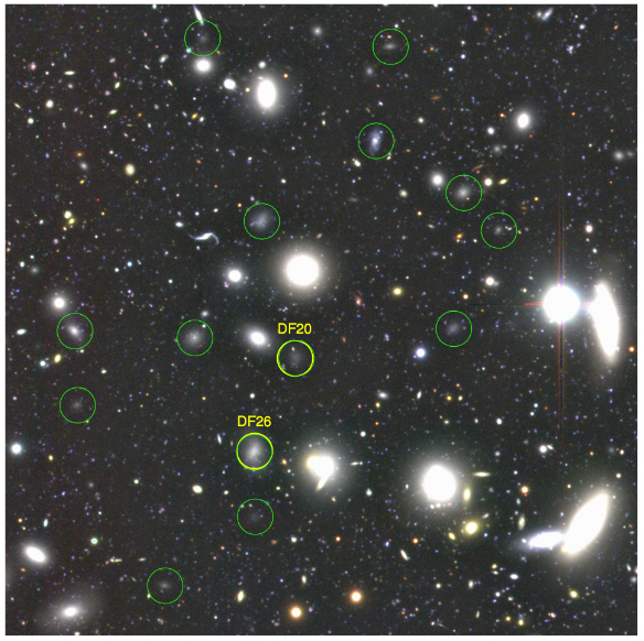 Coma cluster UDgalaxies